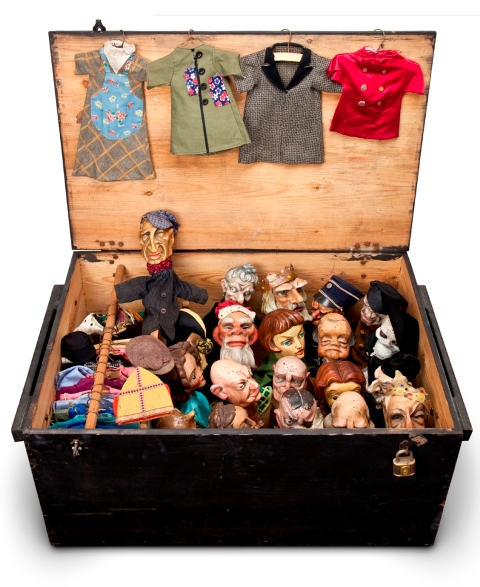 Vervoerskist met de poppen en hun kledij van poppenspel Den Uyl